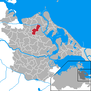 Katzow, Landkreis Ostvorpommern, Mecklenburg-Vorpommern